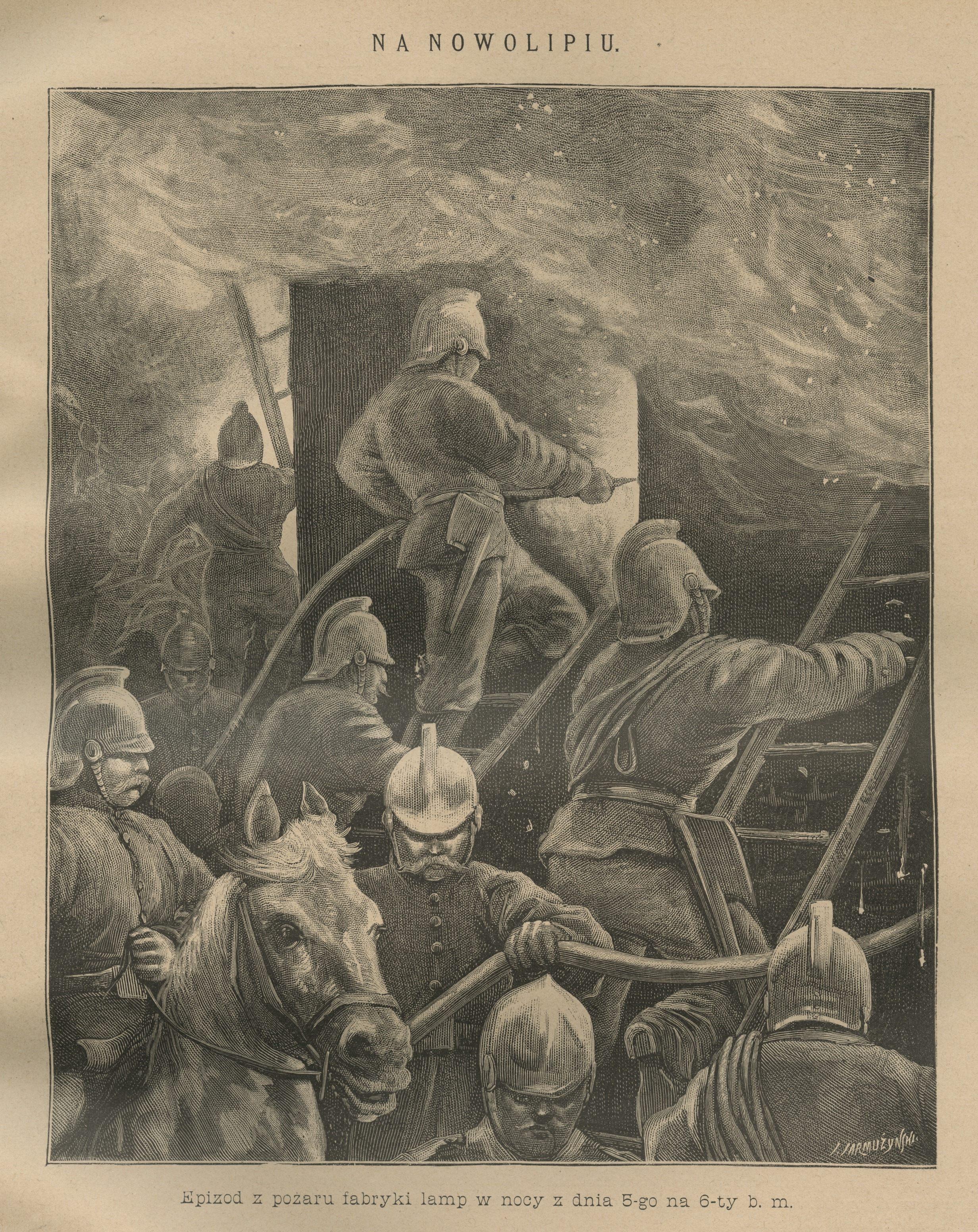 Epizod z pożaru fabryki lamp w nocy z dnia 5-go na 6-ty b. m. Serkowskiego, na Nowolipiu 76